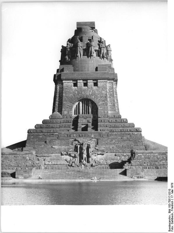 Leipzig, Völkerschlachtdenkmal ADN-ZB Gahlback 17.5.1978 Leipzig: Das Völkerschlachtdenkmal.